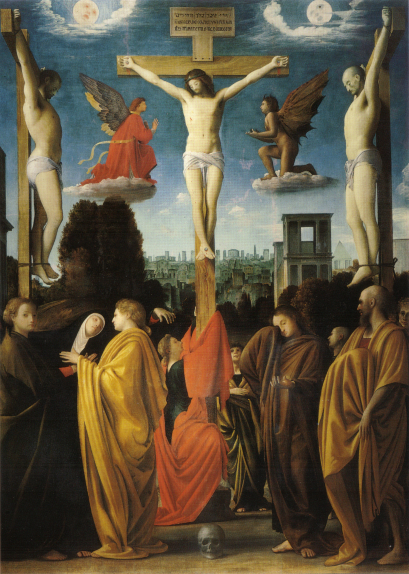 Crucifixion